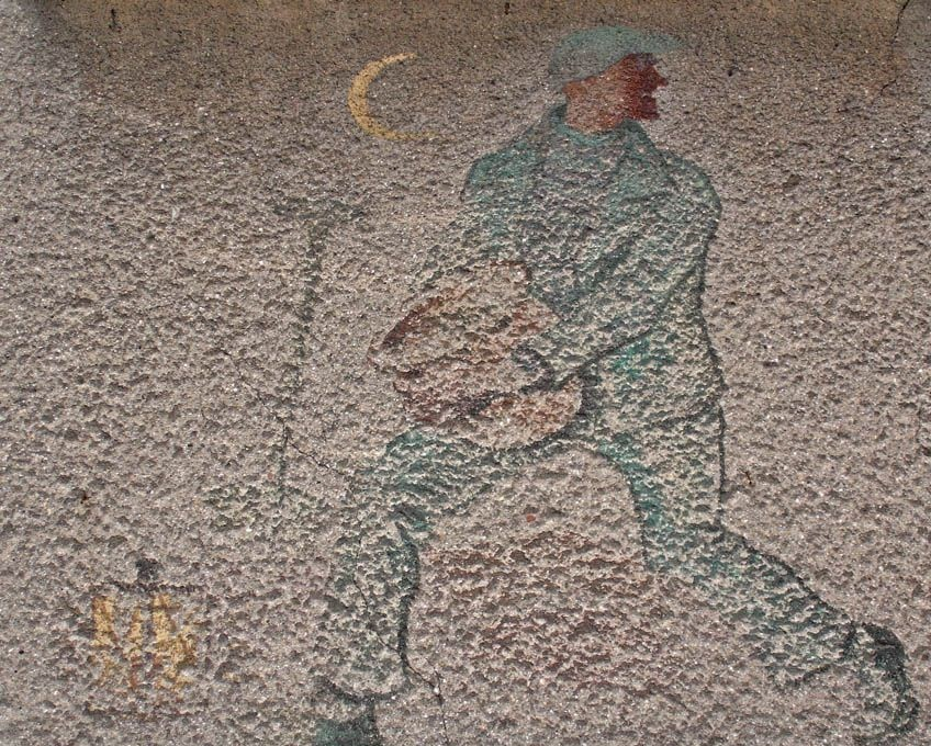 Jeden z fresków Maxa Sternagela na fasadzie dawnego banku w Jedlinie-Zdrój (1958)Fresko an Kreissparkassenfiliale in Bad Charlottenbrunn (1958)